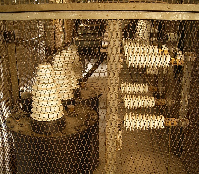 Jugendstil-Kraftwerk in Heimbach / Art Nouveau power plant in Heimbach, Germany